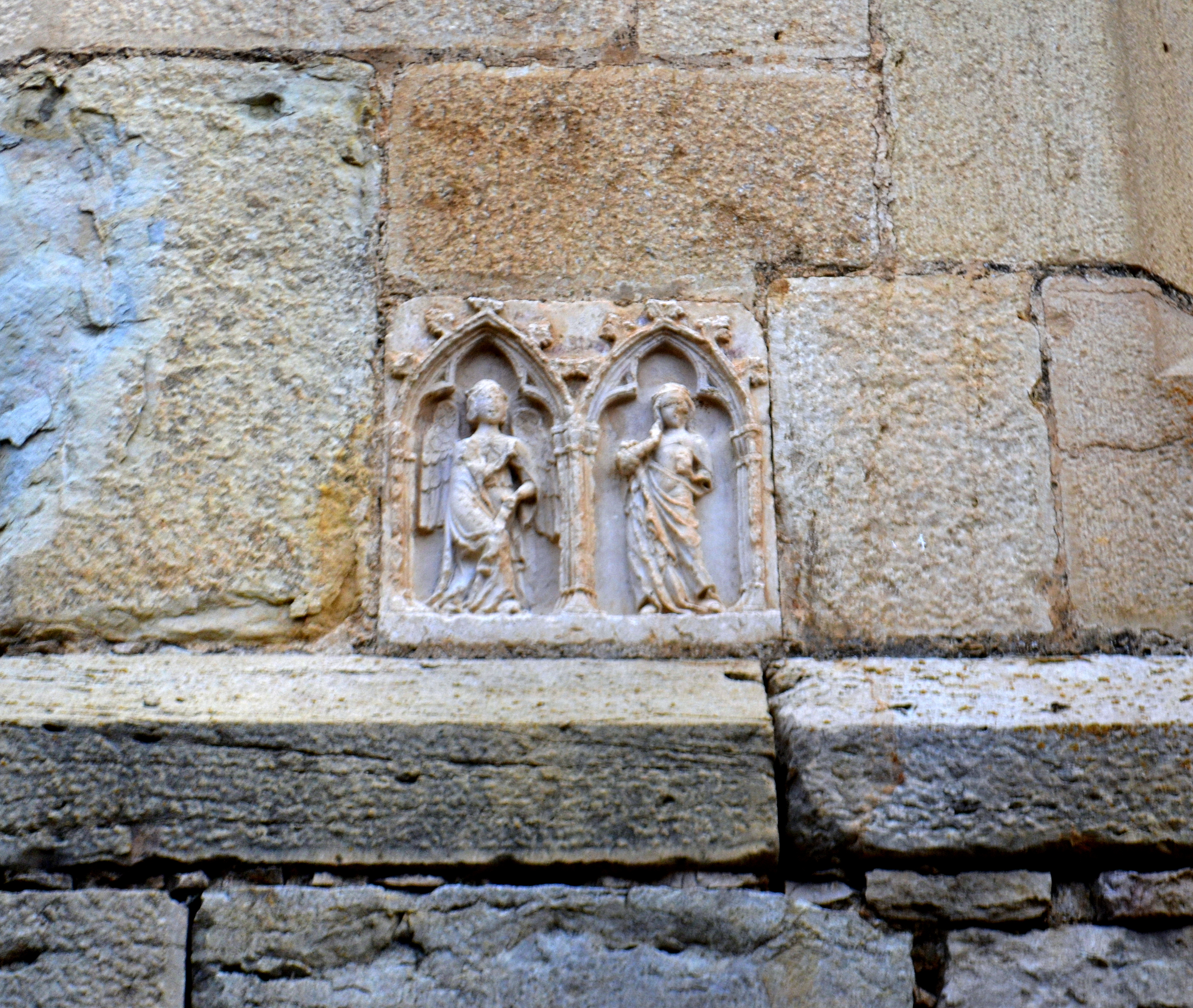 Església parroquial de l'Assumpció (Castellfort) 01.038-001.